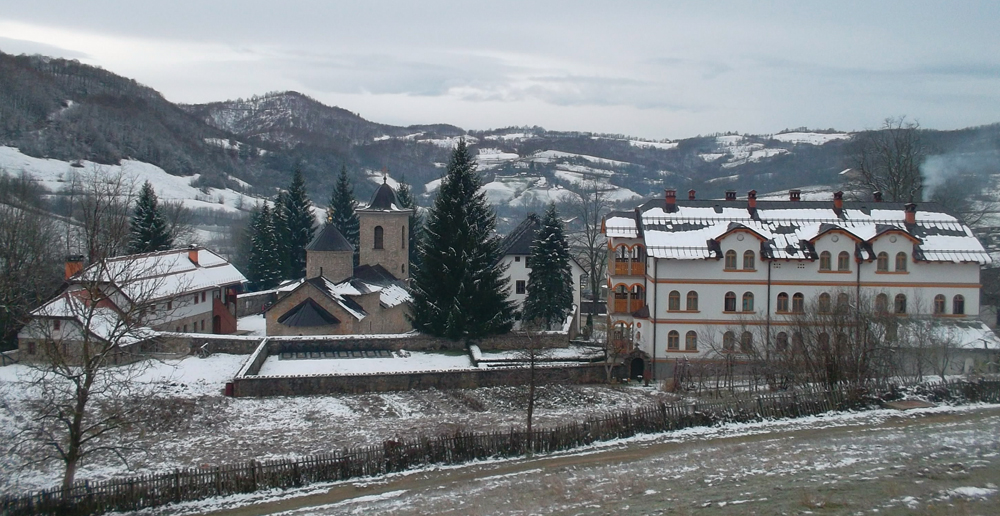 Манастир Гомионица